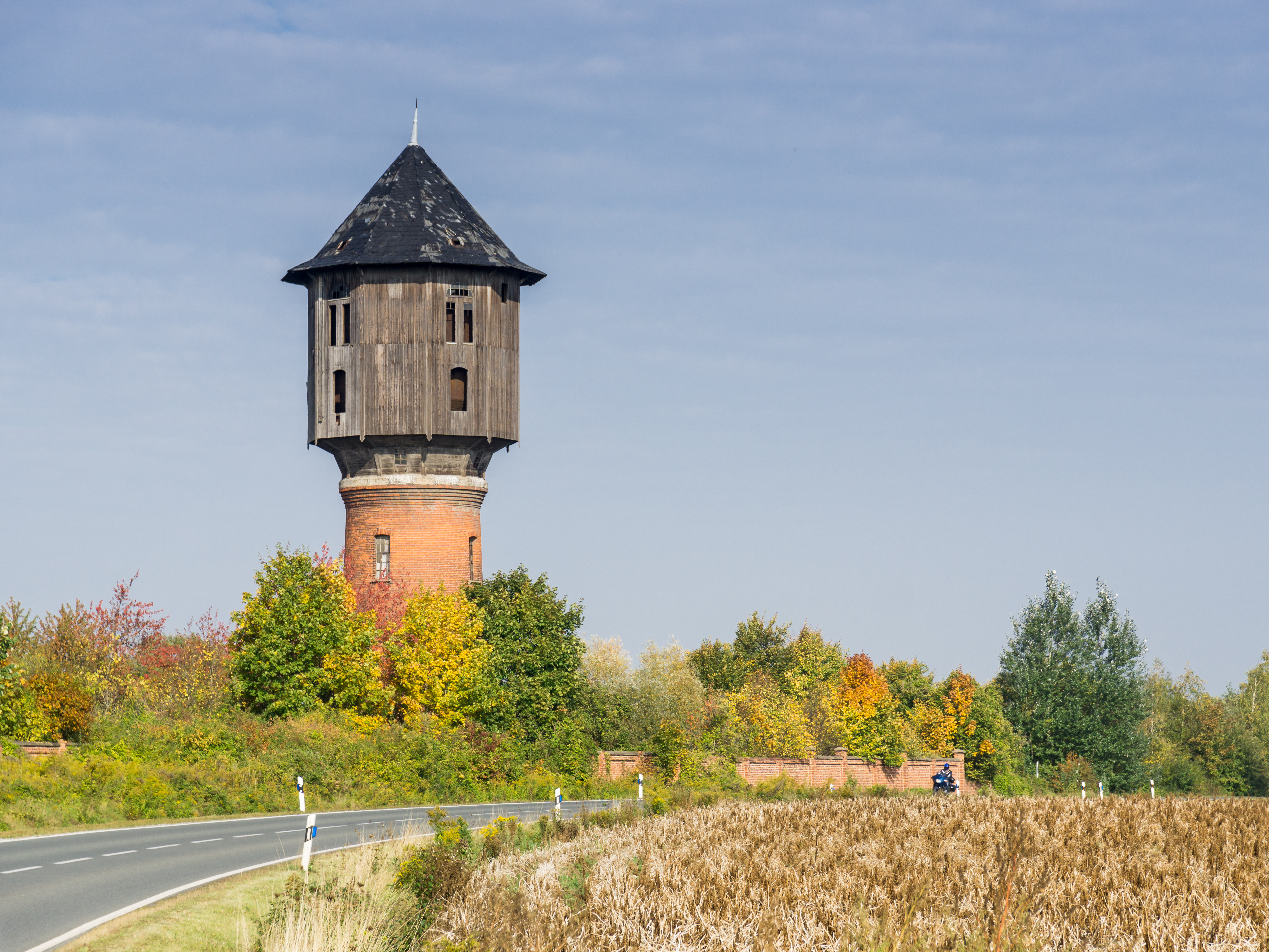 Wasserturm des ehemaligen Kali- und Steinsalzschachtes Anhalt, Am Bleicherdewerk 1 in Staßfurt OT Leopoldshall